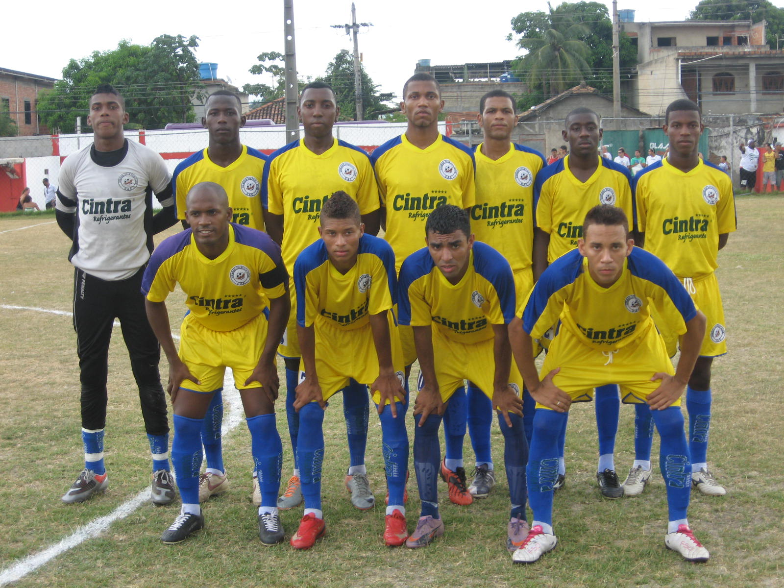 Equipe profissional do Condor Atlético Clube em 2011